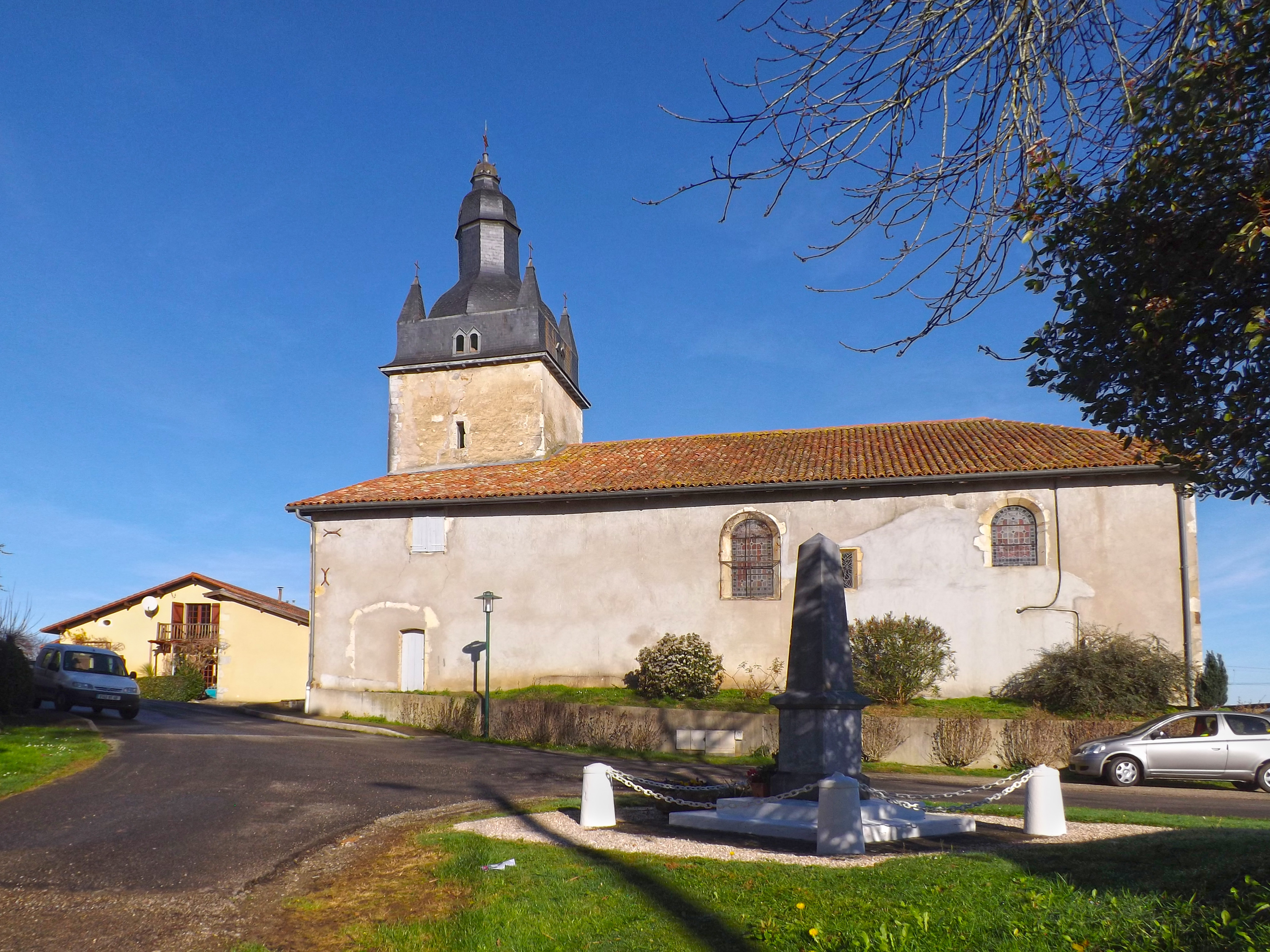 Église Saint-Barthélemy de Bastennes, Landes, France